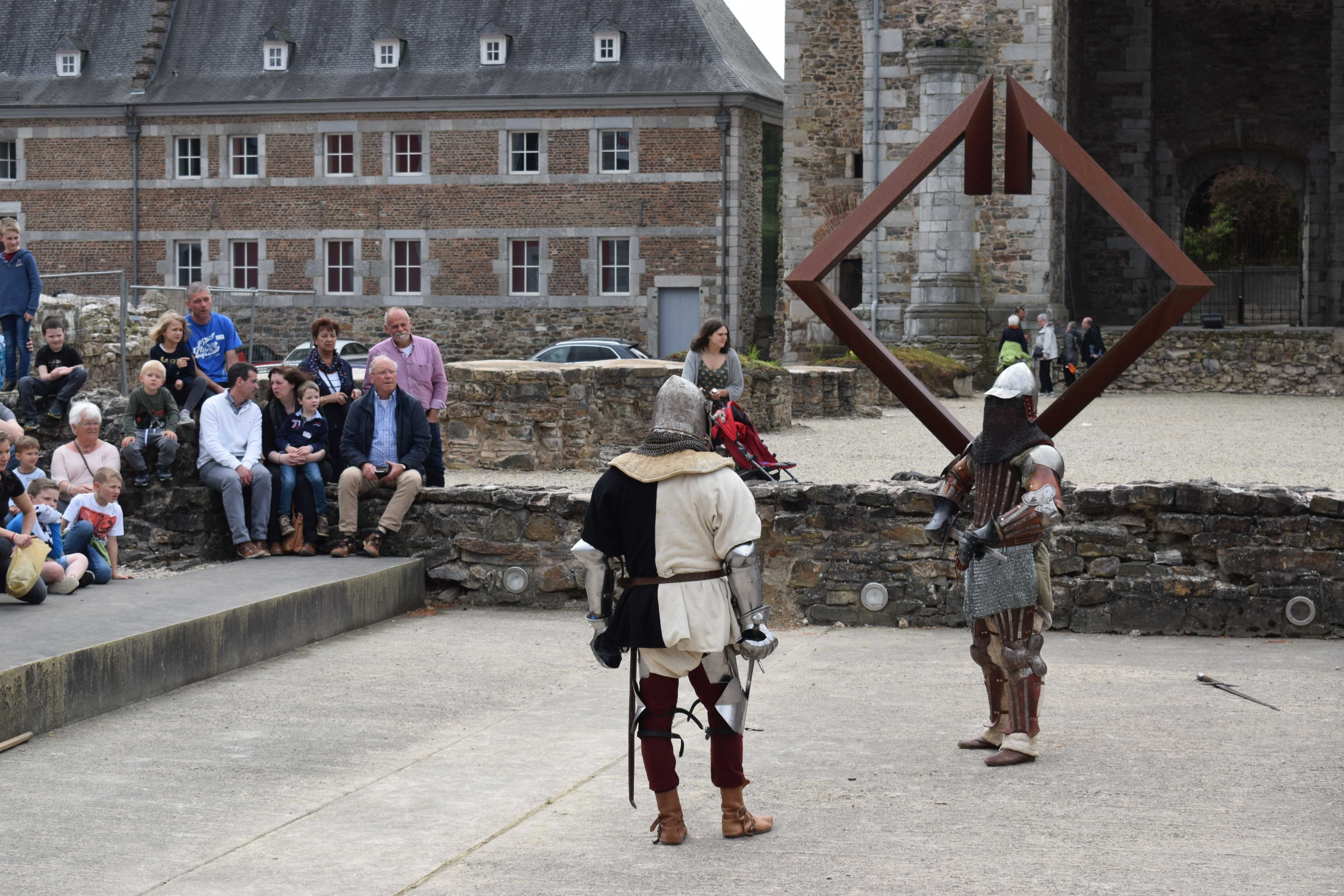 Vue d'une reconstitution de combats du Moyen Âge, à l'ancienne abbaye de Stavelot (Belgique).